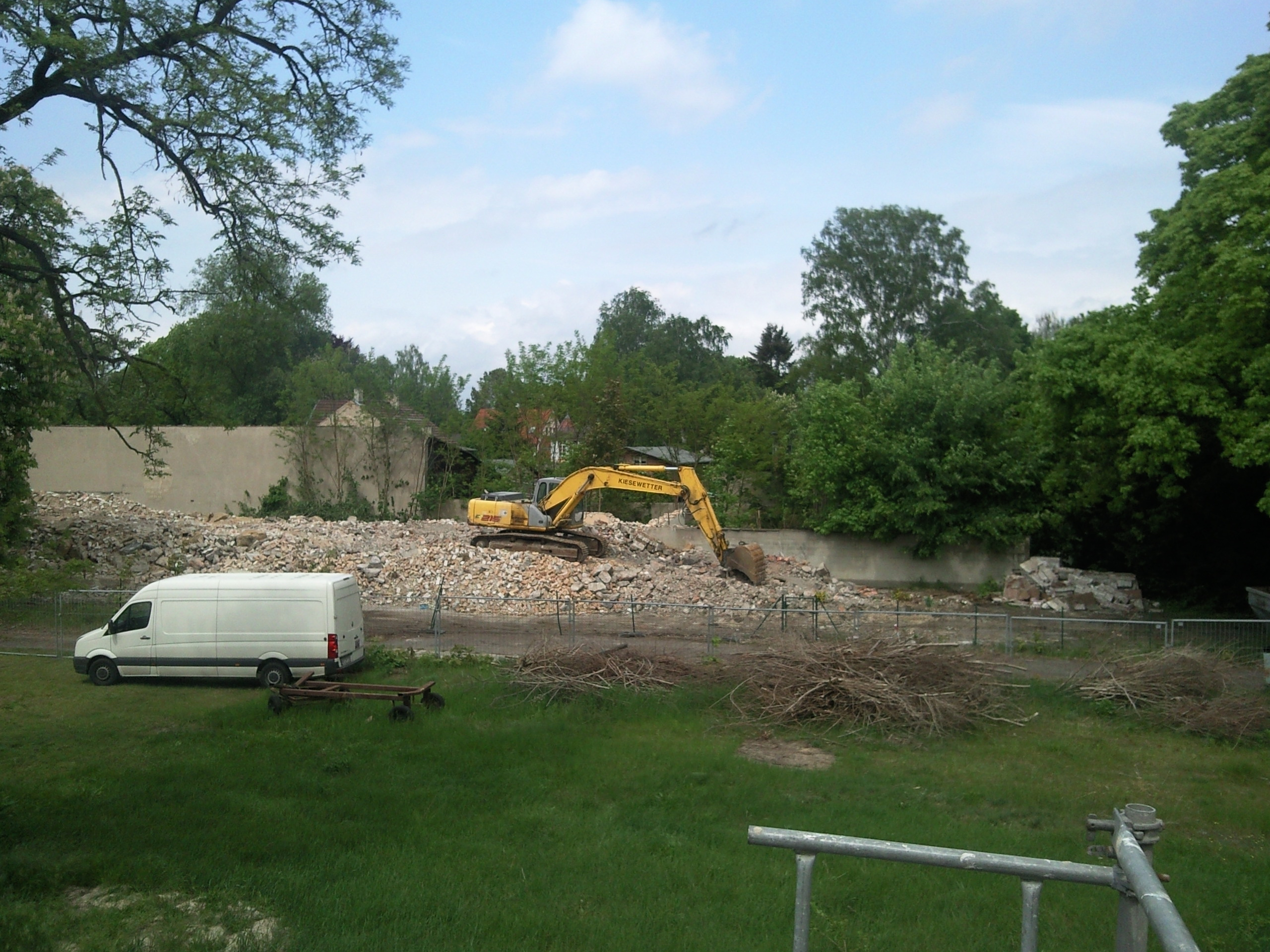 Im Mai 2010 erfolgte der Abbruch des seit vielen Jahren leestehenden Sporthauses Ziegenhals